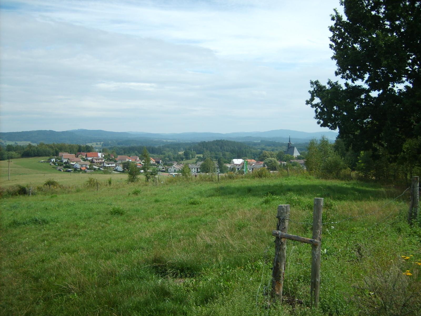 General view to Dolní Dvořiště from west.